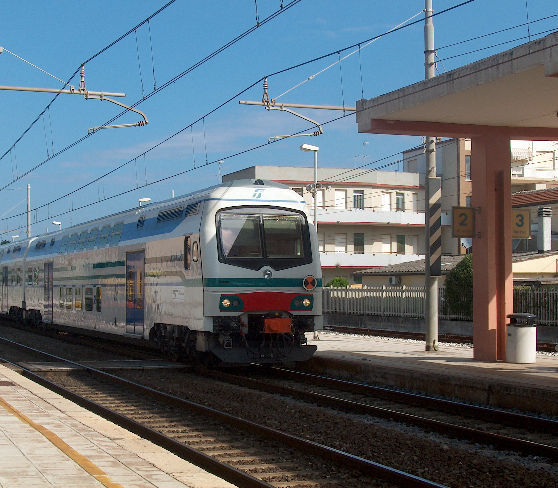 Treno Vivalto in arrivo alla stazione di Marotta-Mondolfo